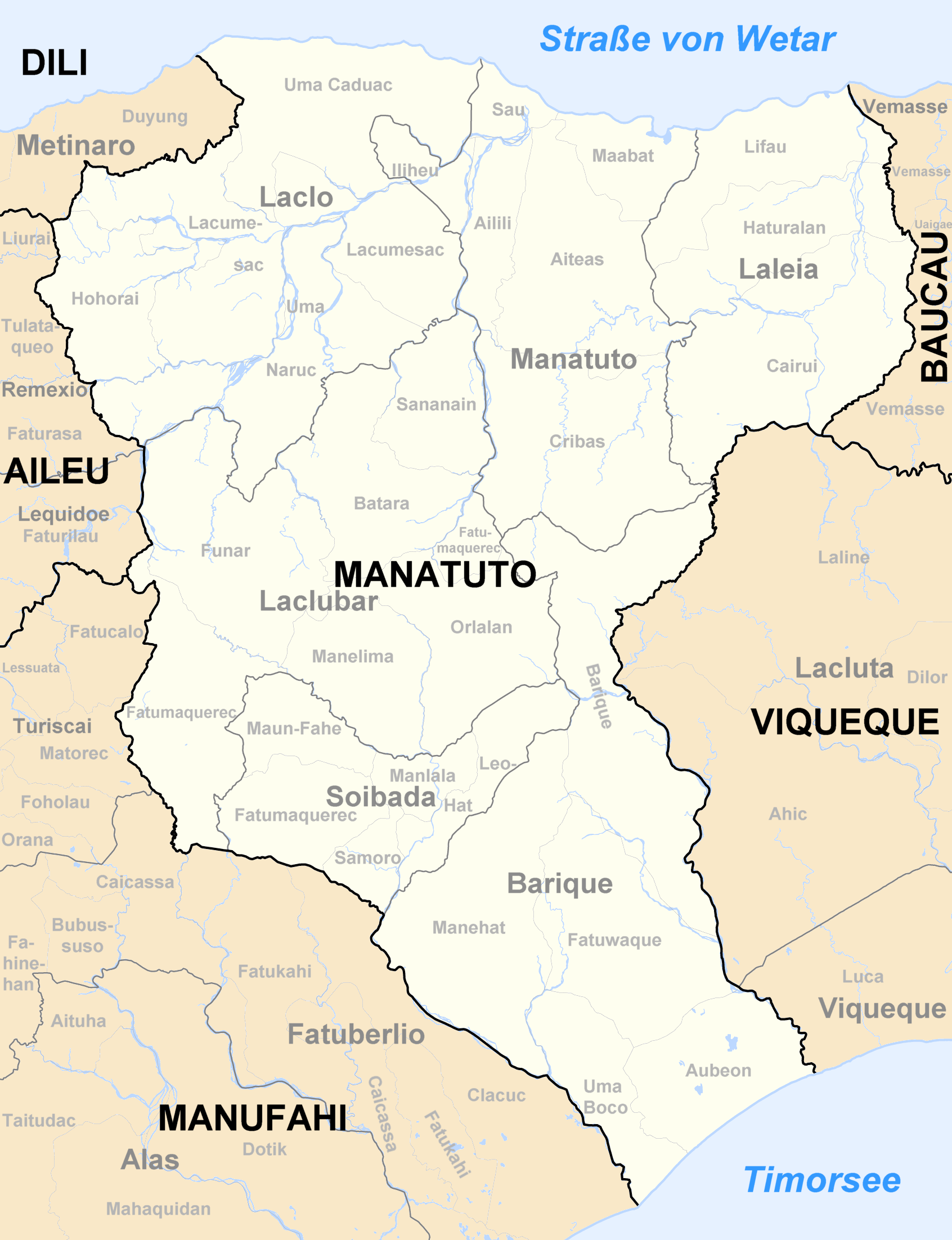 Sucos des Distrikts Manatuto/Osttimor nach der Neustrukturierung 2004